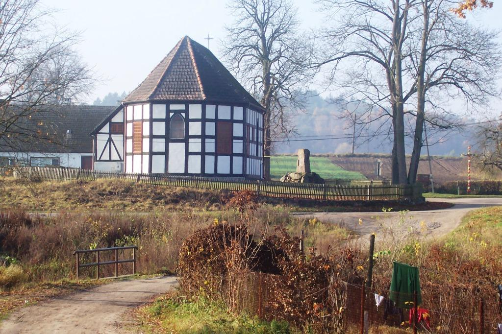 Ostrowąsy - Kościół salowy p.w. Matki Boskiej Różańcowej o konstrukcji szachulcowej, ok. XVI w. przebudowany ok. 1730 r.; widok od strony wschodniej (zabytek nr rejestr. 334)